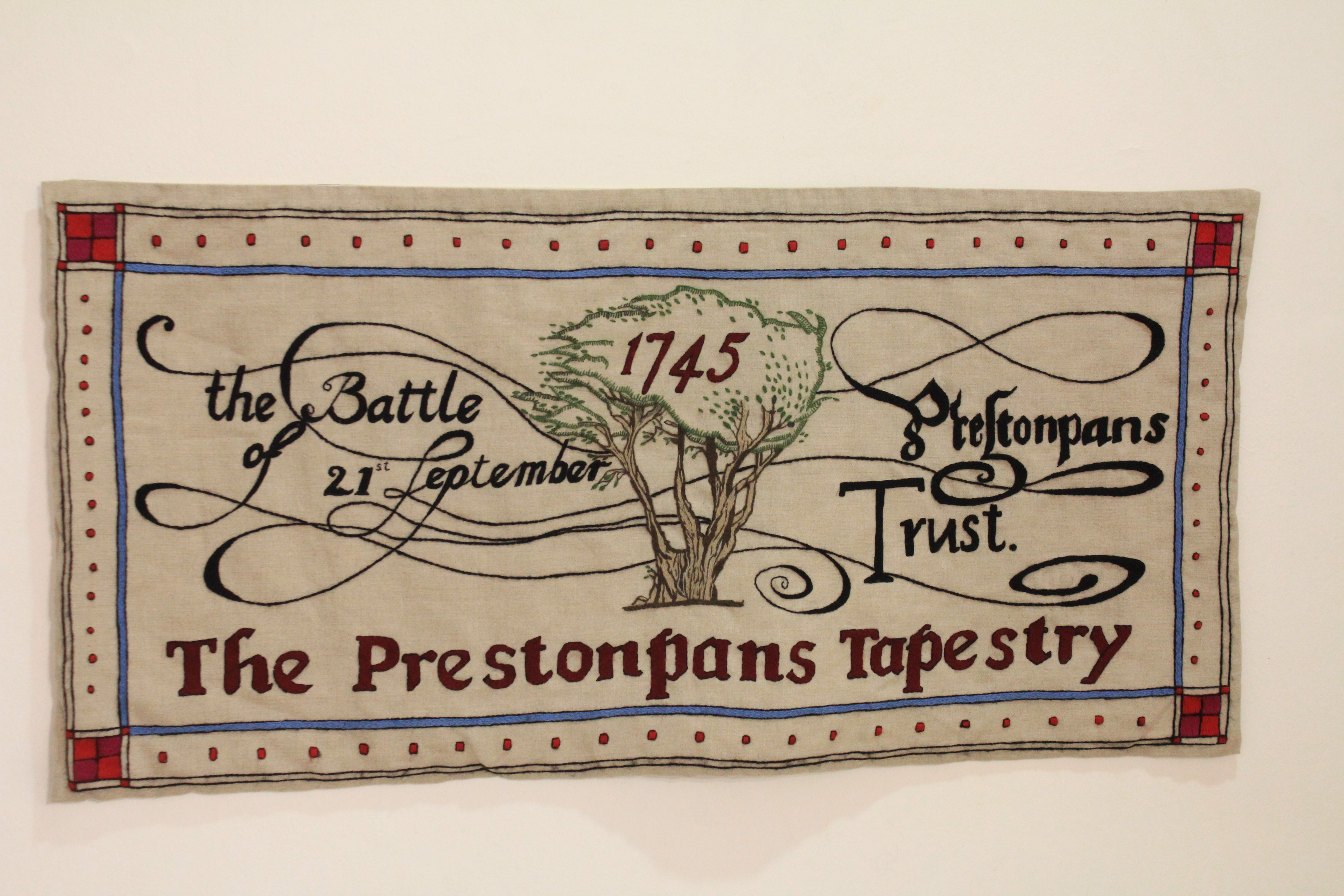 Exposition de la Prestonpans Tapestry lors du festival interceltique de Lorient 2017